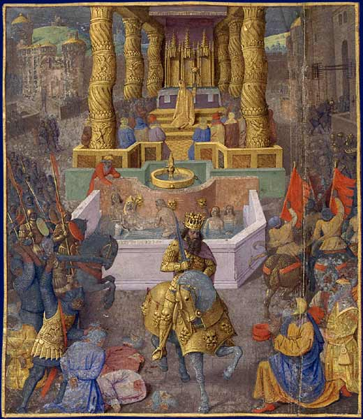 Prise de Jérusalem par Hérode le Grand en 36 av. J.-C. Flavius Josèphe, Les Antiquités judaïques, enluminure de Jean Fouquet, vers 1470-1475. Paris, BnF, département des Manuscrits, NAF 21013, fol. 1v. (Livre XV). En 36 av. J.-C., Hérode le Grand entre en vainqueur à Jérusalem. Derrière lui, dans la piscine probatique, Jean Fouquet a figuré l'assassinat par noyade du grand prêtre Aristobule III. En arrière-plan, le grand prêtre célèbre le culte dans le sanctuaire du Temple de Jérusalem.